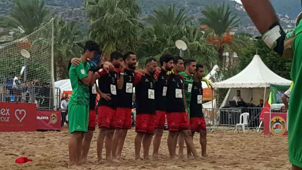 تیم شاهین خزر رودسر در جام جهانی باشگاه های جهان. سال ۱٣٩٨